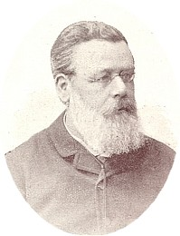 Friedrich Nitsche (1835 - 1923), Rakouský a český právník a politik německé národnosti.